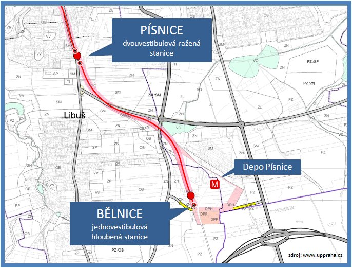 Situace kolem jižní konečné trasy D pražského metra podle návrhu územního plánu roku 2010. Poznámka: v konceptu územního plánu na adrese se název stanice Bělnice nevyskytuje. Naopak, konečná stanice se tam v textové závazné části i důvodové zprávě nazývá Depo Písnice, v mapové části názvem popsána není.